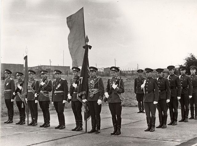 Боевое знамя 39 гв. мсд